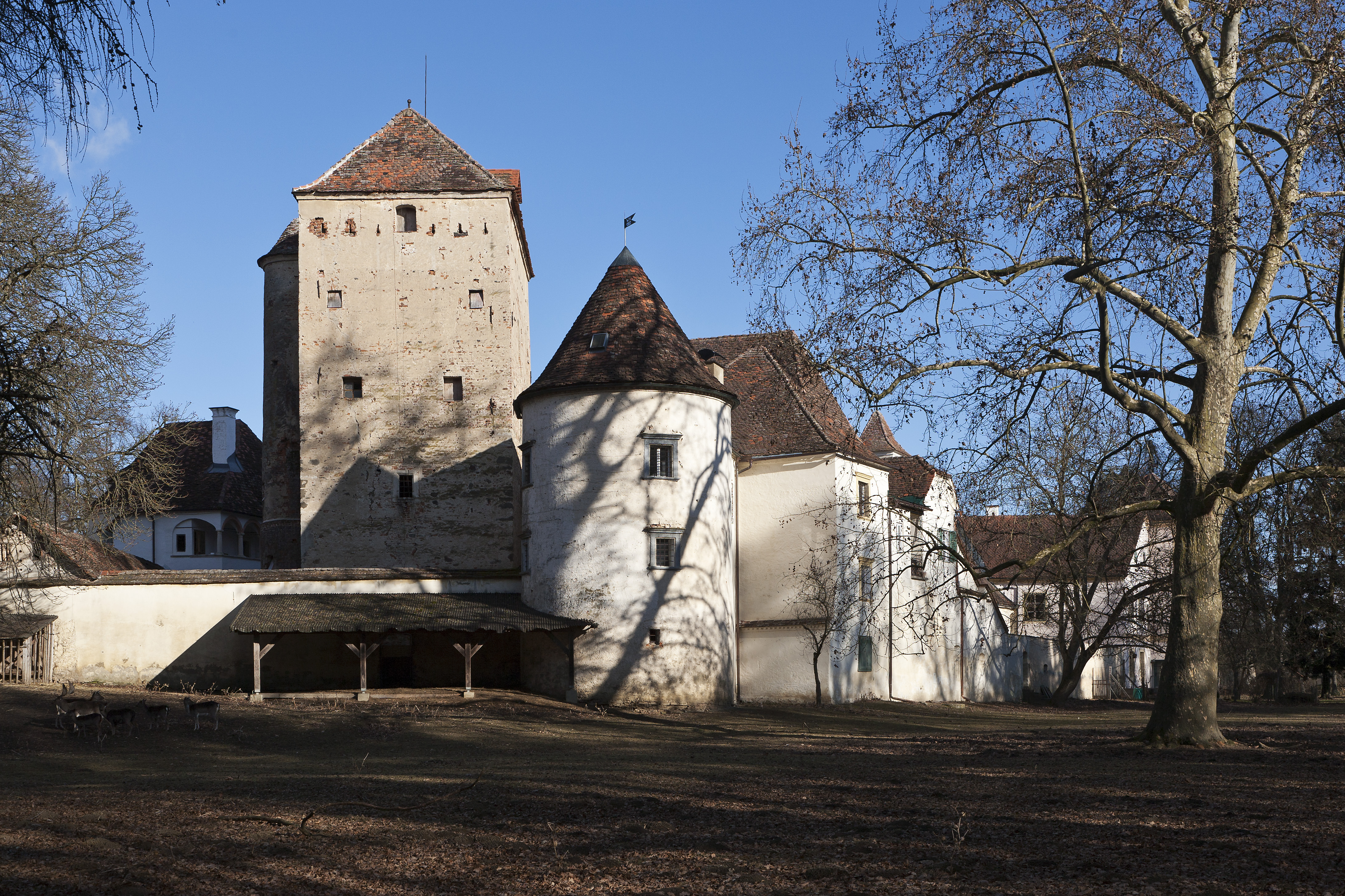 Schloss Feistritz bei Ilz; Westseite mit Wohnturm